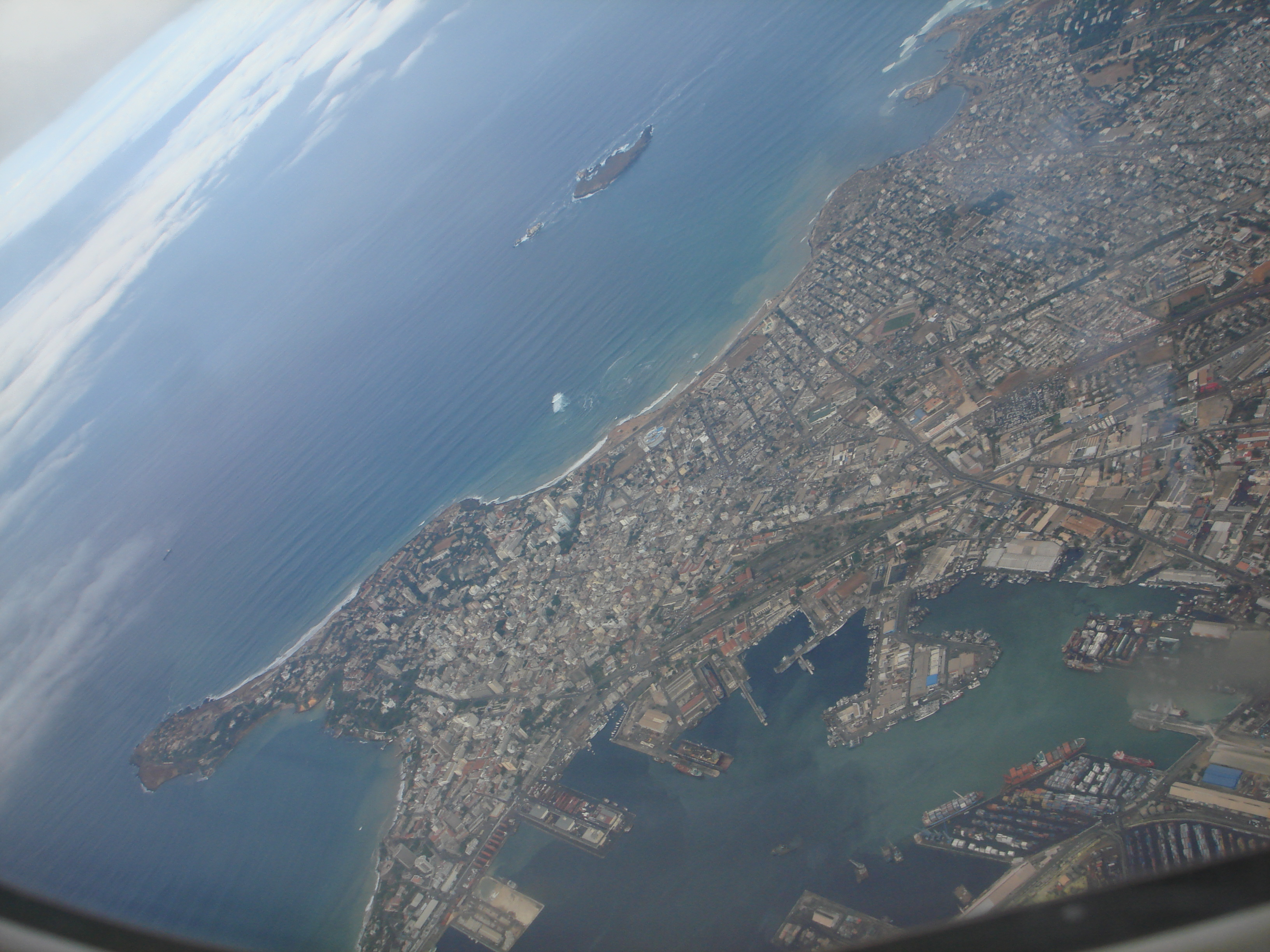 Vue aérienne du port de Dakar et des îles de la Madeleine (Sénégal)